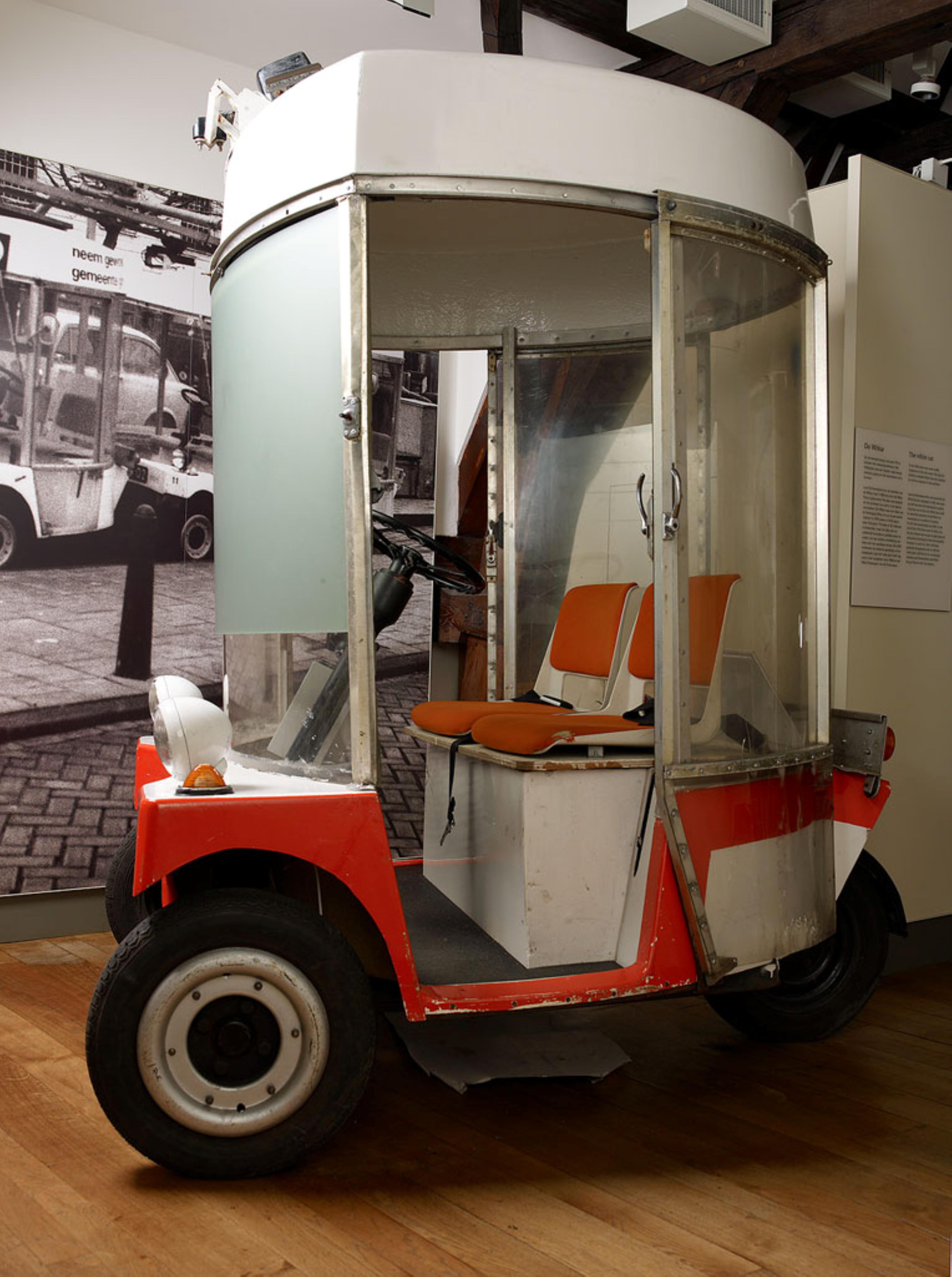 In 1968 introduceerde Luud Schimmelpennink de eerste elektrische auto in Amsterdam: de Witkar. Ook toen ging het al om het bestrijden van de luchtvervuiling. De Witkar was een klein, hoog wagentje dat eruit zag als een soort kruising tussen een fietstaxi en de Pausmobiel. Hij had drie wielen, twee zitplaatsen en een 24 volt elektromotor. Maximum snelheid: 30 kilometer per uur. In het Amsterdams Historisch Museum staat een origineel exemplaar.